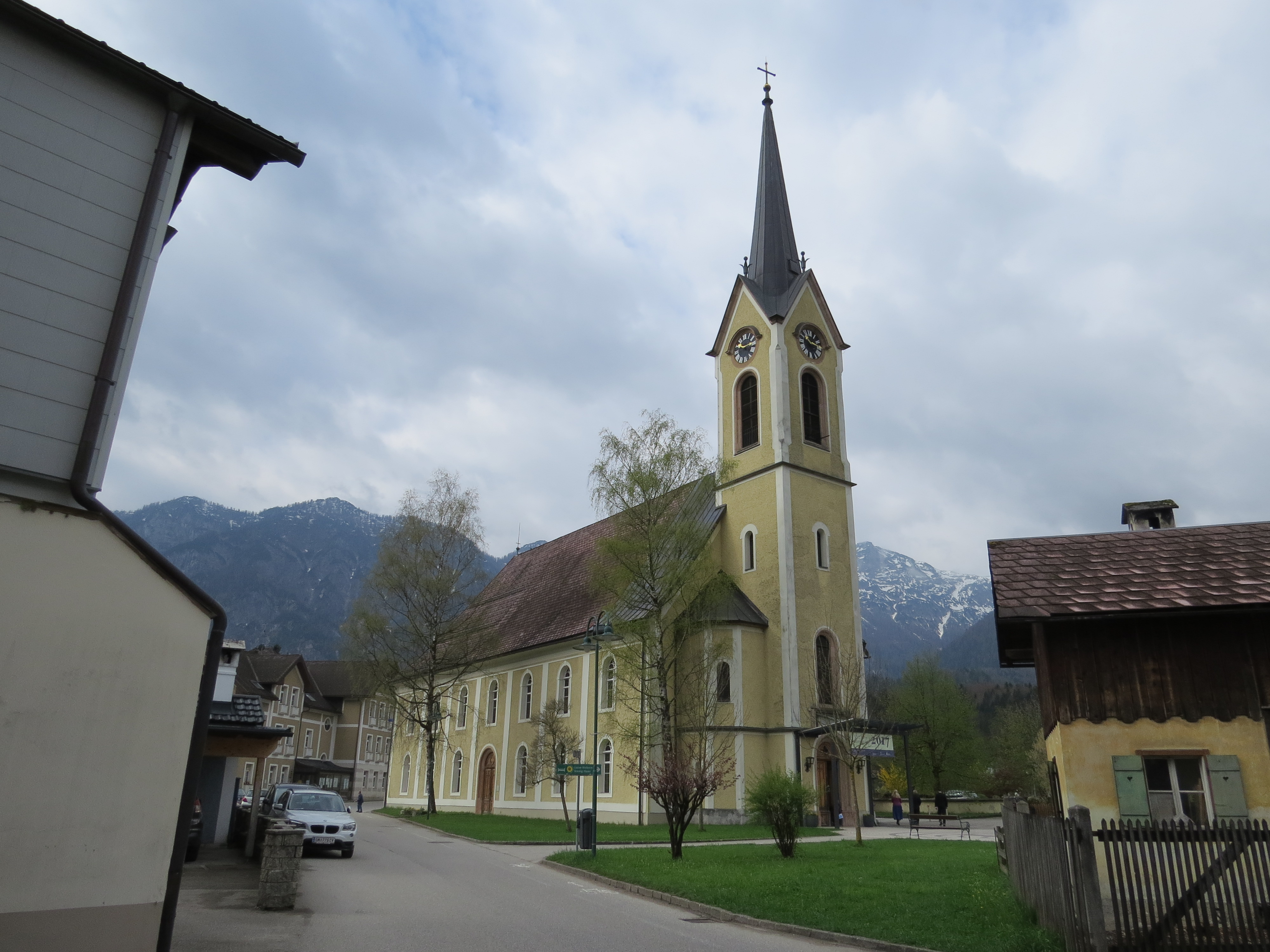 Evang. Pfarrkirche, gegenüber Ramsauer Strasse 7, 4822 Bad Goisern